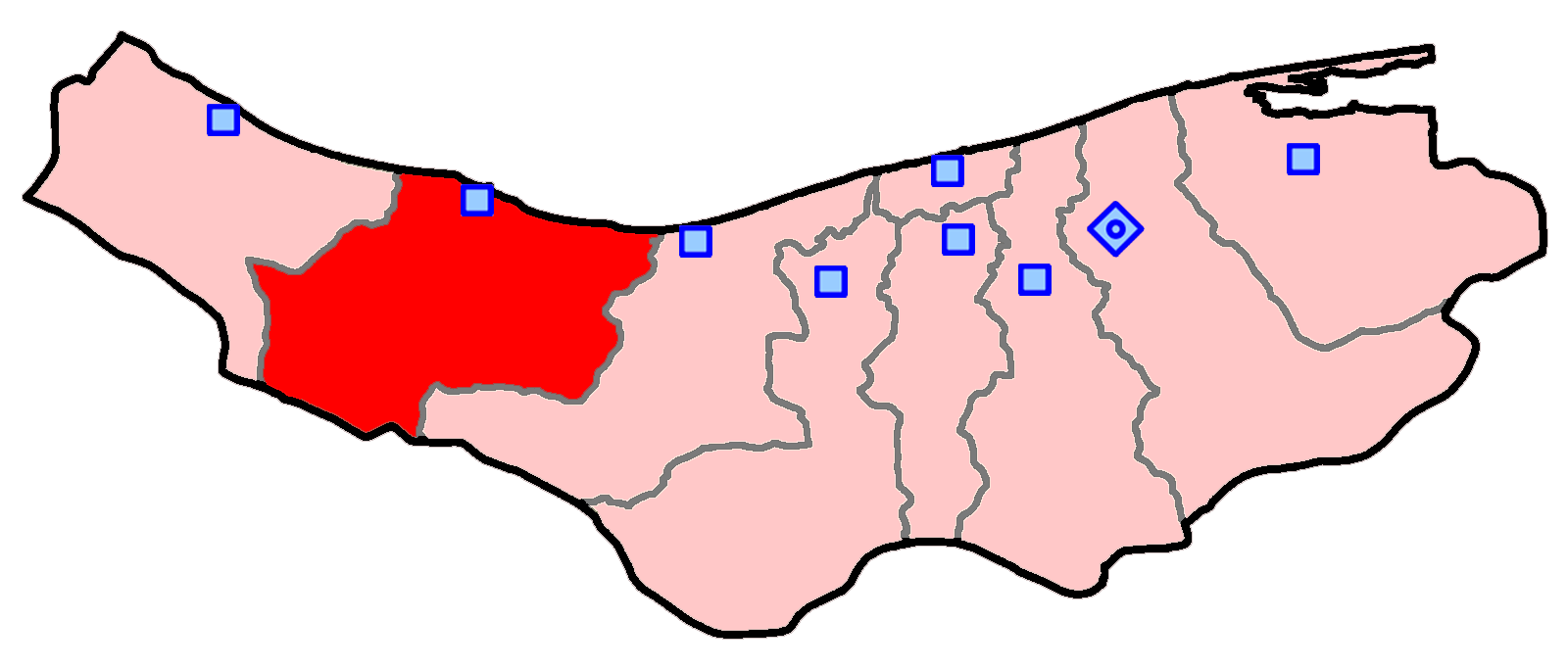 حوزهٔ انتخاباتی نوشهر، چالوس و کلاردشت برای انتخابات مجلس شورای اسلامی